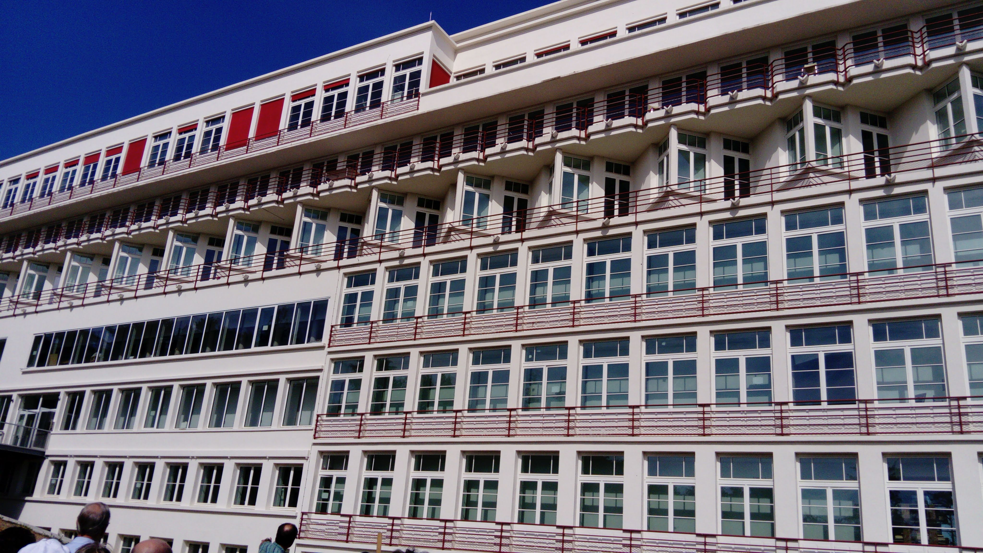 Vue de l'arrière de l'Ecole Nationale Supérieure d'Architecture de Clermont-Ferrand